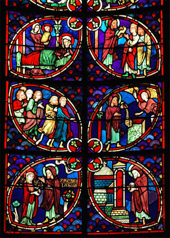 Vitrall de Sant Joan Baptista. Catedral de Bourges